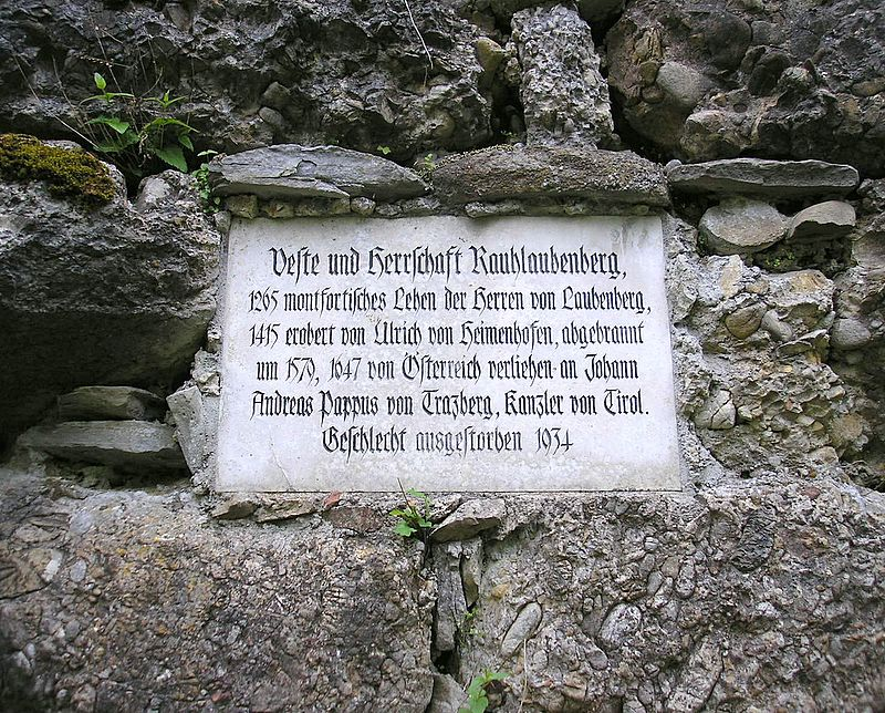 Burg Rauhlaubenberg bei Immenstadt im Allgäu (Landkreis Oberallgäu, Bayerisch-Schwaben). Gedenktafel am Wohnturm. Eigene Aufnahme, Mai 2008 / Rauhlaubenberg castle near Immenstadt im Allgäu (Landkreis Oberallgäu, Bavaria, Germany). Commemorative plaque at the keep. Own photo, May 2008